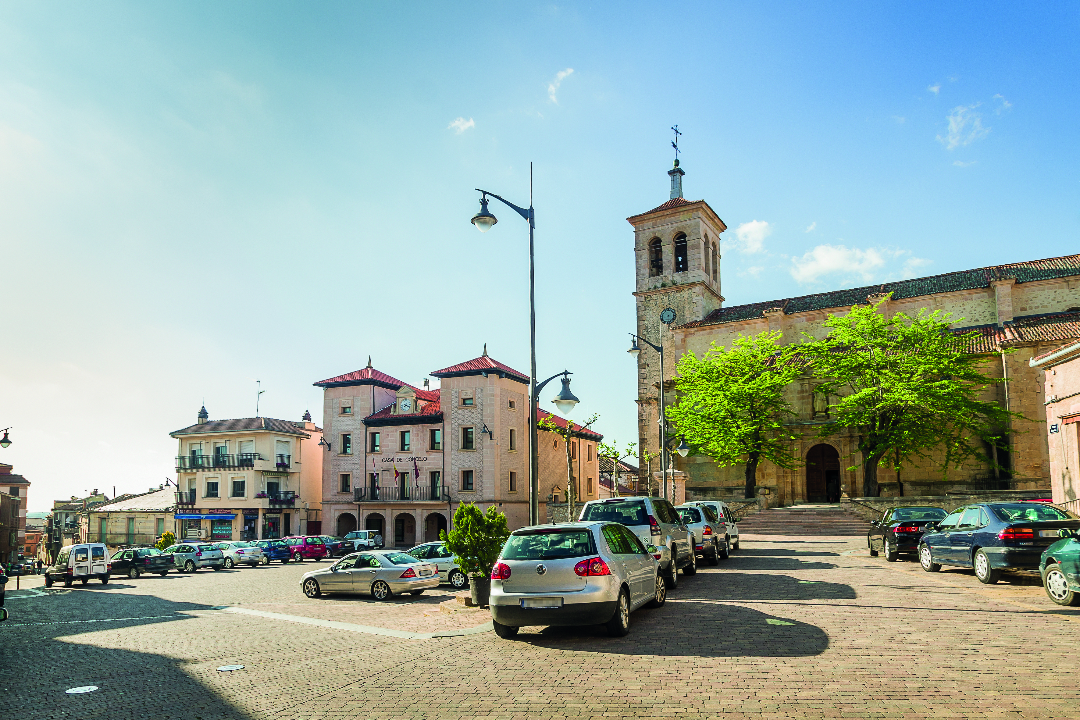 Ayuntamiento y plaza de Cantalejo